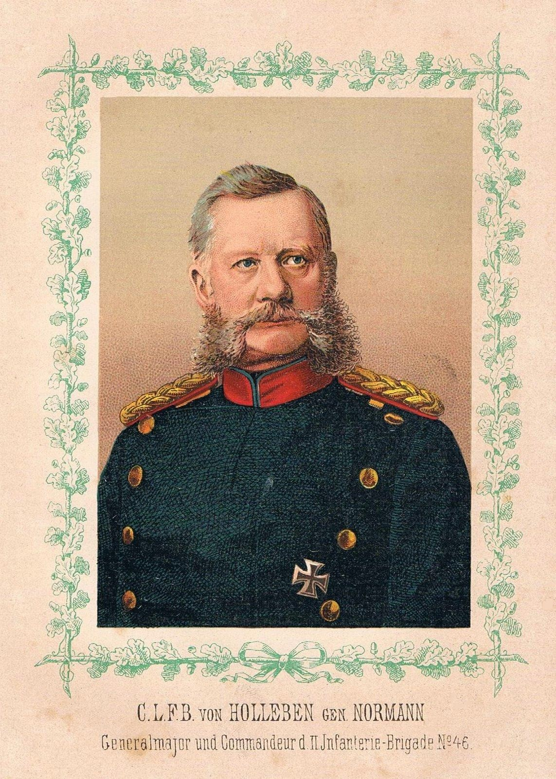 Generalmajor C(arl) L(udwig) F(riedrich) Bernhard von Holleben genannt (von) Normann (auch: von Holleben-Normann, im Freiherrenstand seit 1873; * 30. Juli 1824 in Unterköditz bei Königsee; † 11. Oktober 1897 in Dresden) war zuletzt im Rang eines königlich-sächsischen Generals der Infanterie ein sächsischer Heerführer im 19. Jahrhundert (vgl. hier).